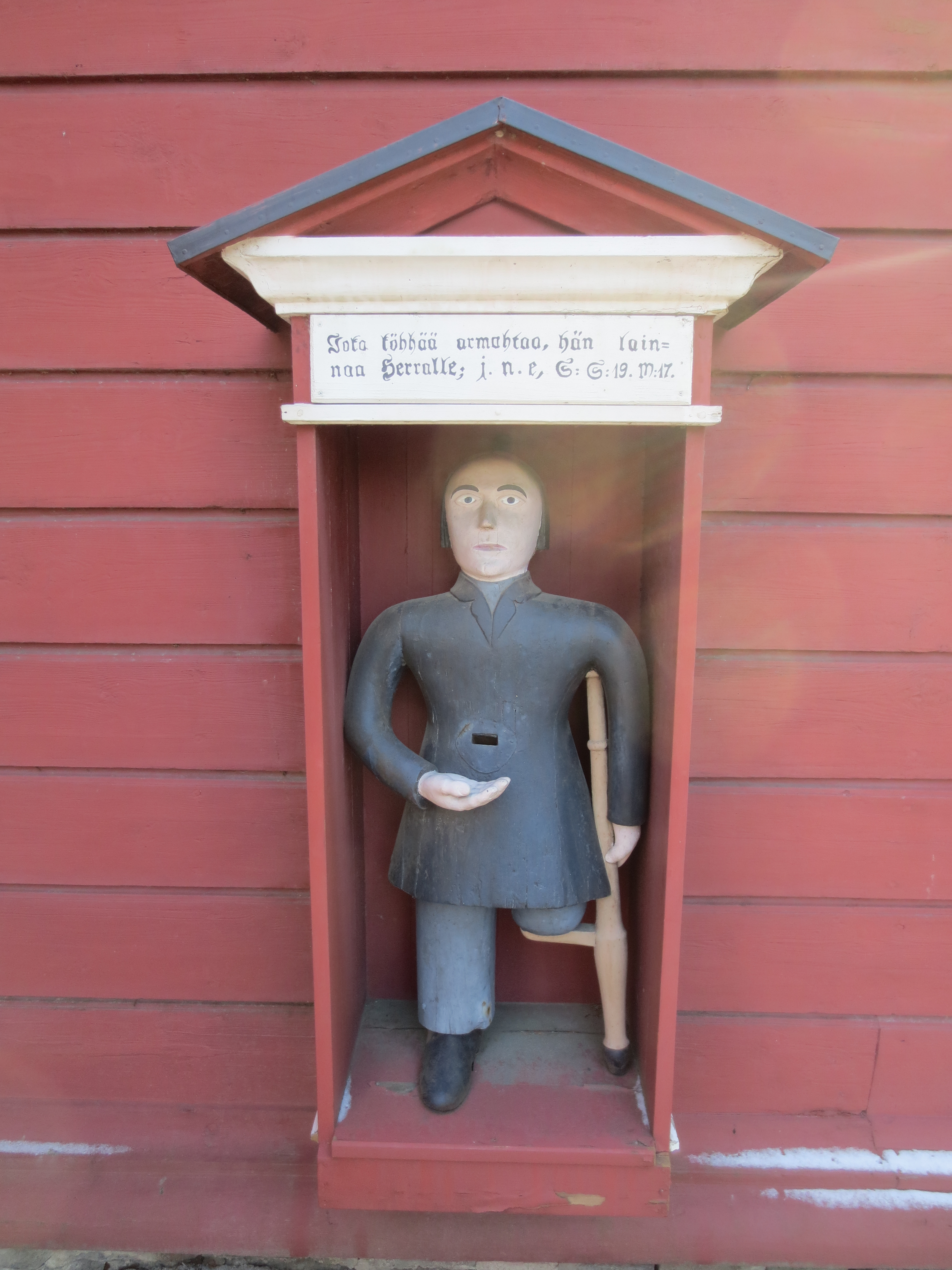 Vaivaisukko Teiskon kirkon seinässä, Tampereella